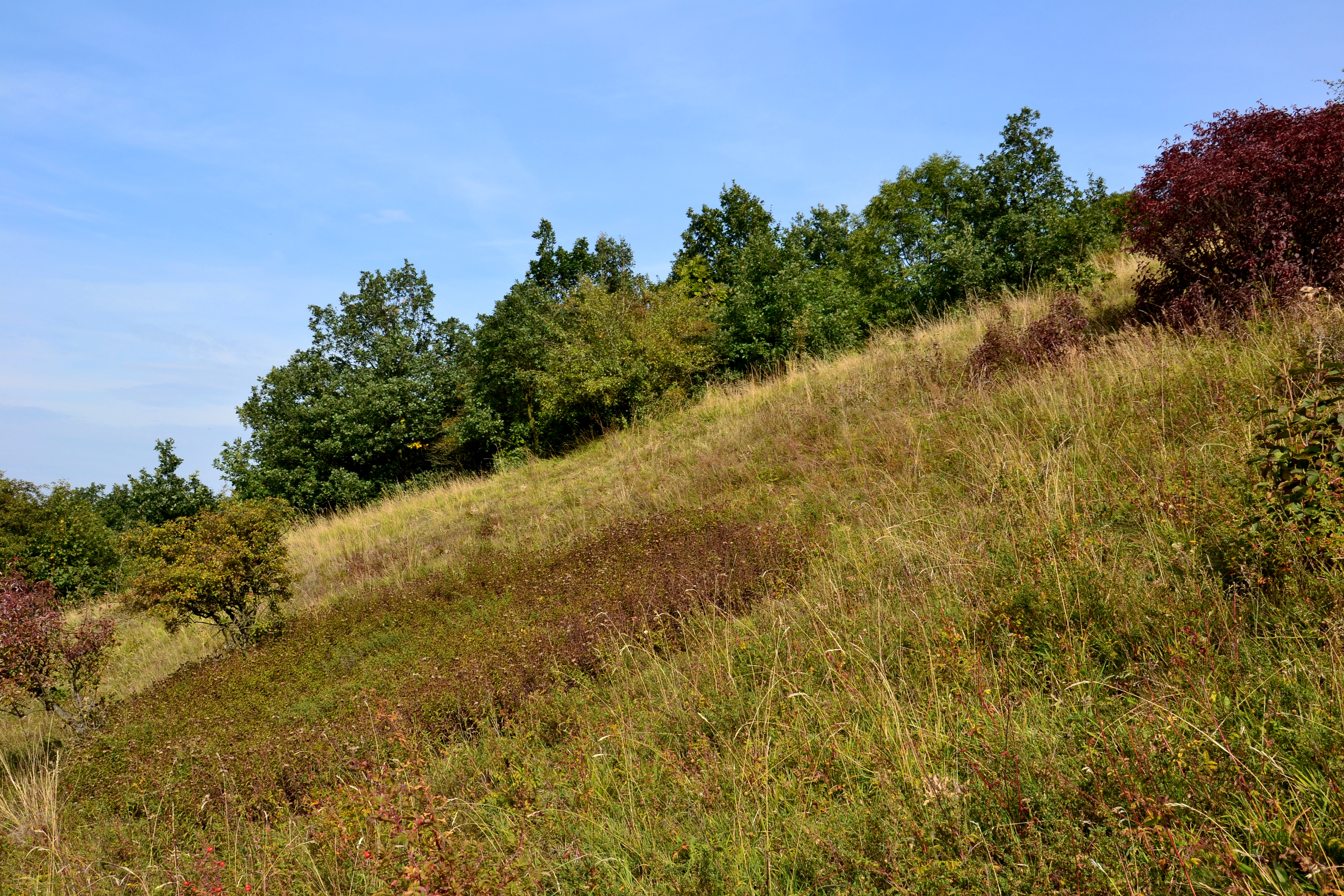 Přírodní památka Lužické šipáky